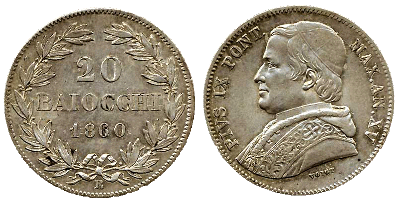 Moneta da 20 baiocchi dello Stato della Chiesa, battuta nel 1860 sotto papa Pio IX.